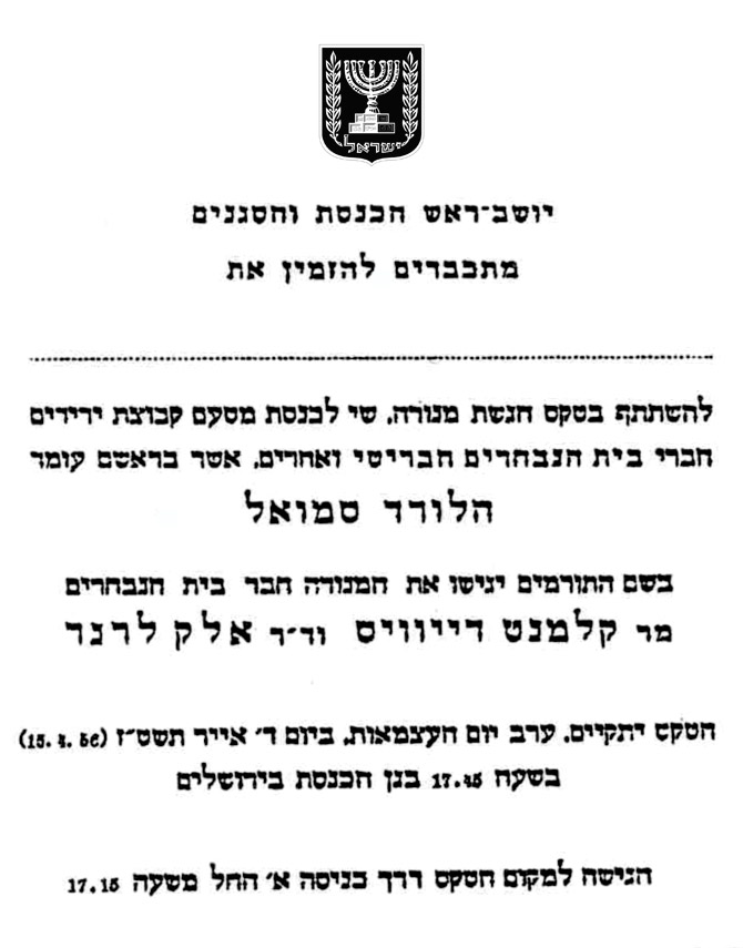 הזמנה לטקס חנוכת מנורת הכנסת